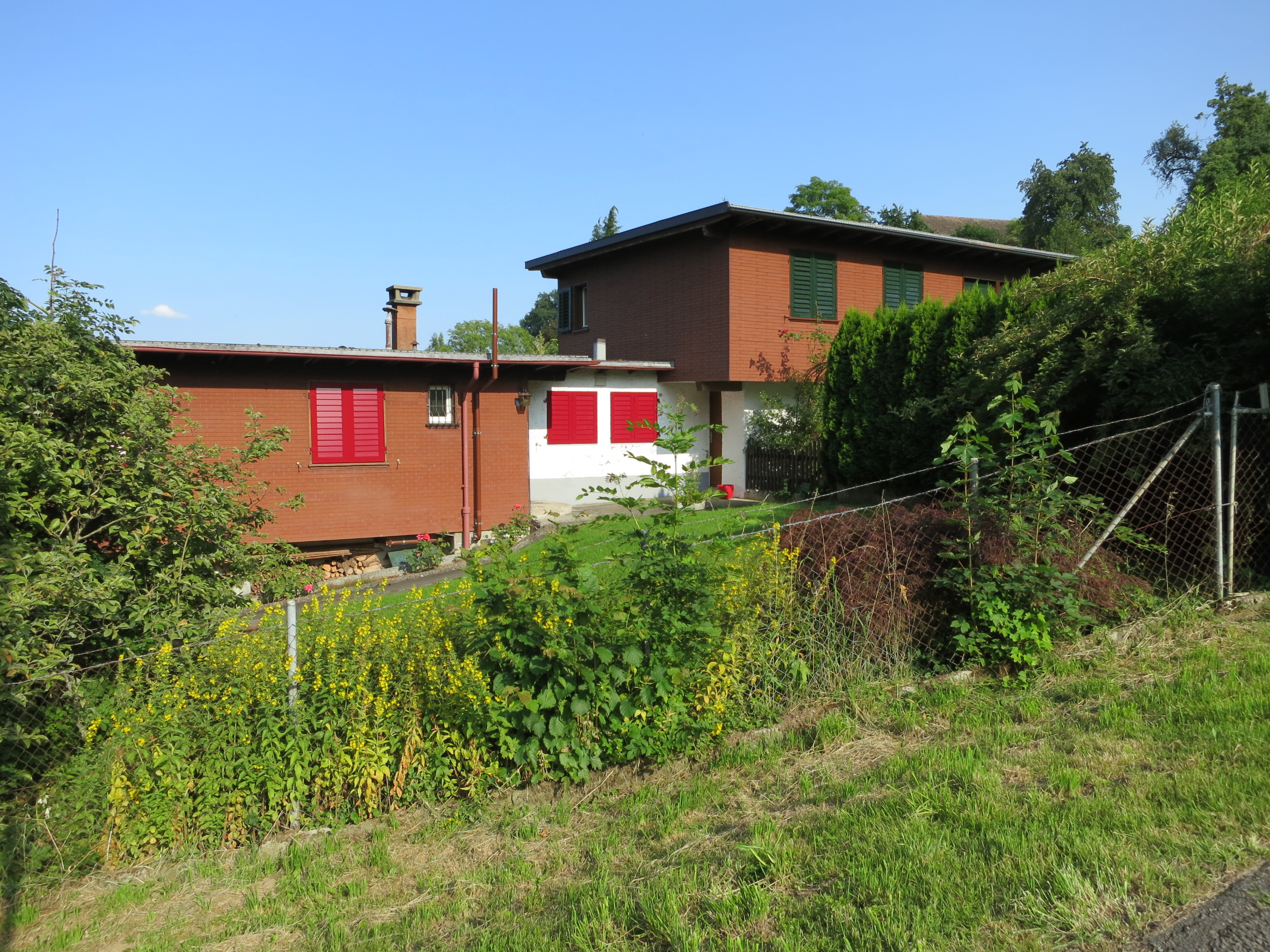 Wohnsiedlung Gwad 1943, Au ZH, Schweiz